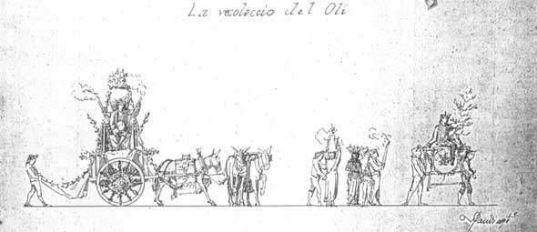 Dibujo de Gaudí para la cabalgata de Vallfogona: La recolección del aceite (1879).